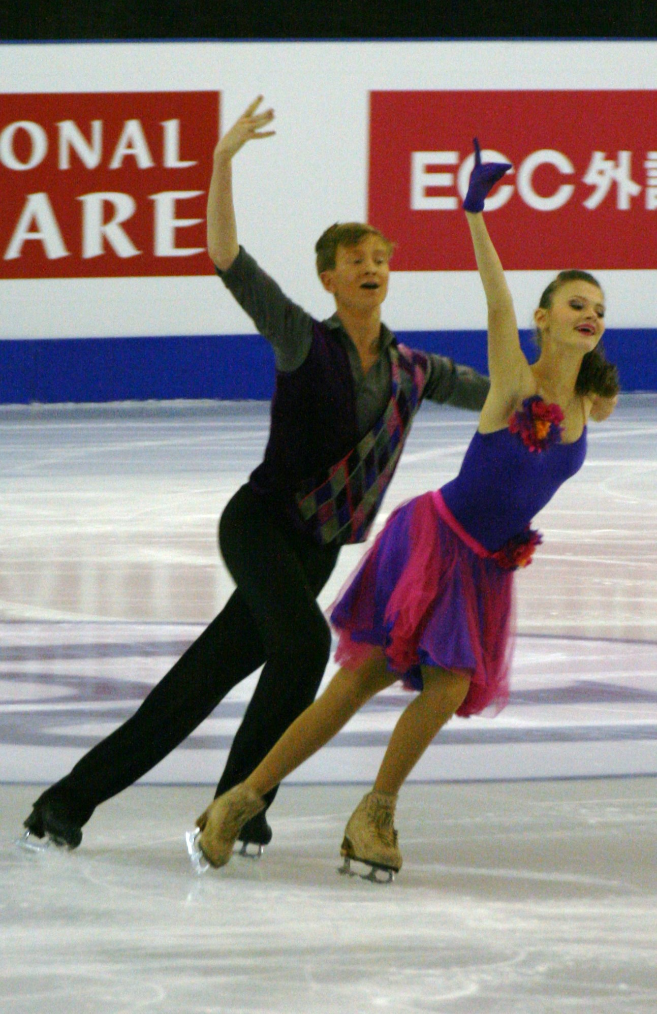 Анаставия Скопцова и Кирилл Алешин (Россия) на финале Гран-при по фигурному катанию среди юниоров 2015-2016.